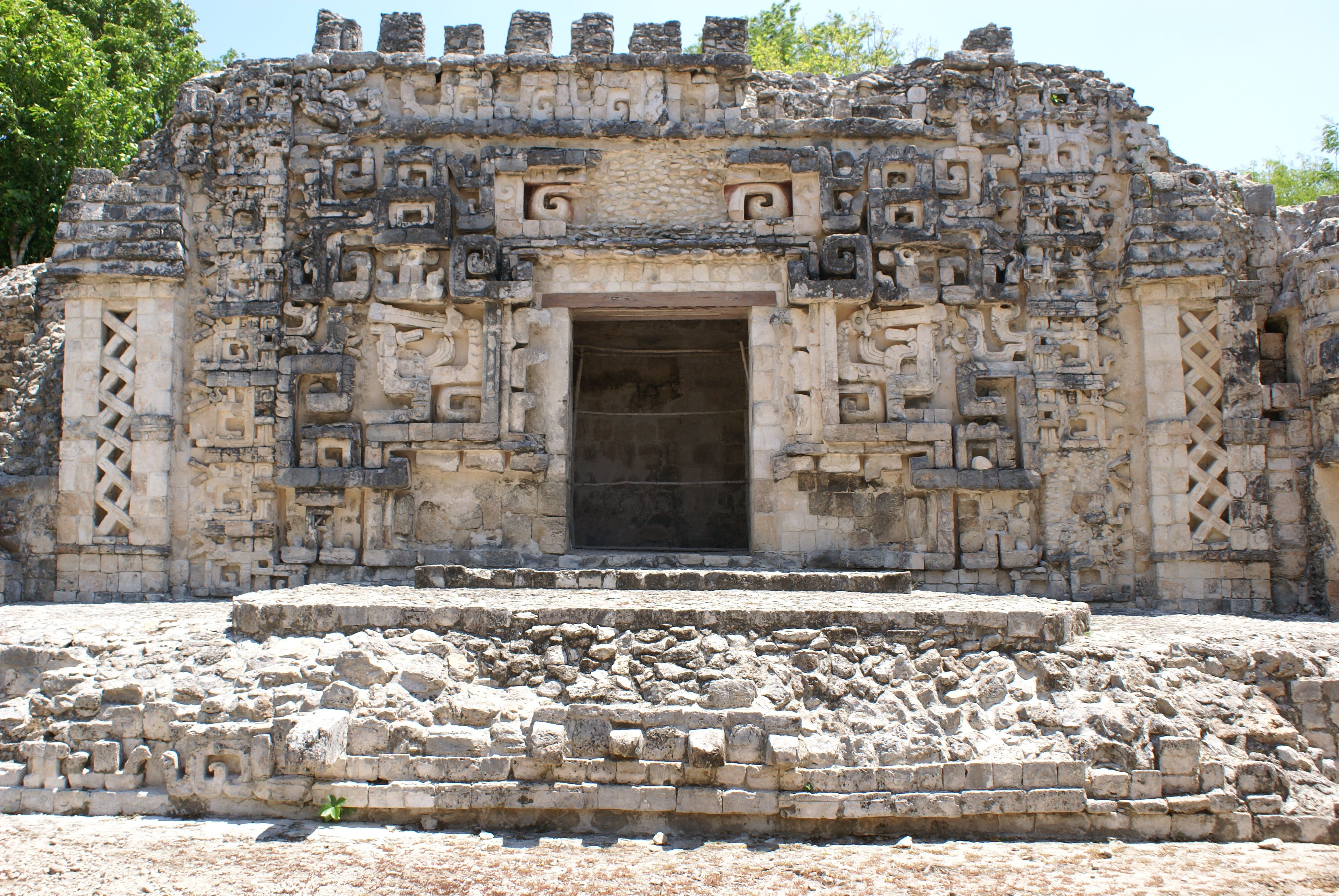 Zona Arqueológica de Hochob